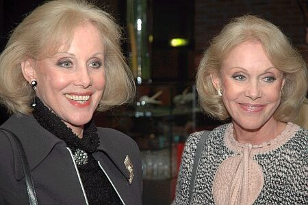 Kessler Zwillinge beim Künstlerempfang im Gasteig